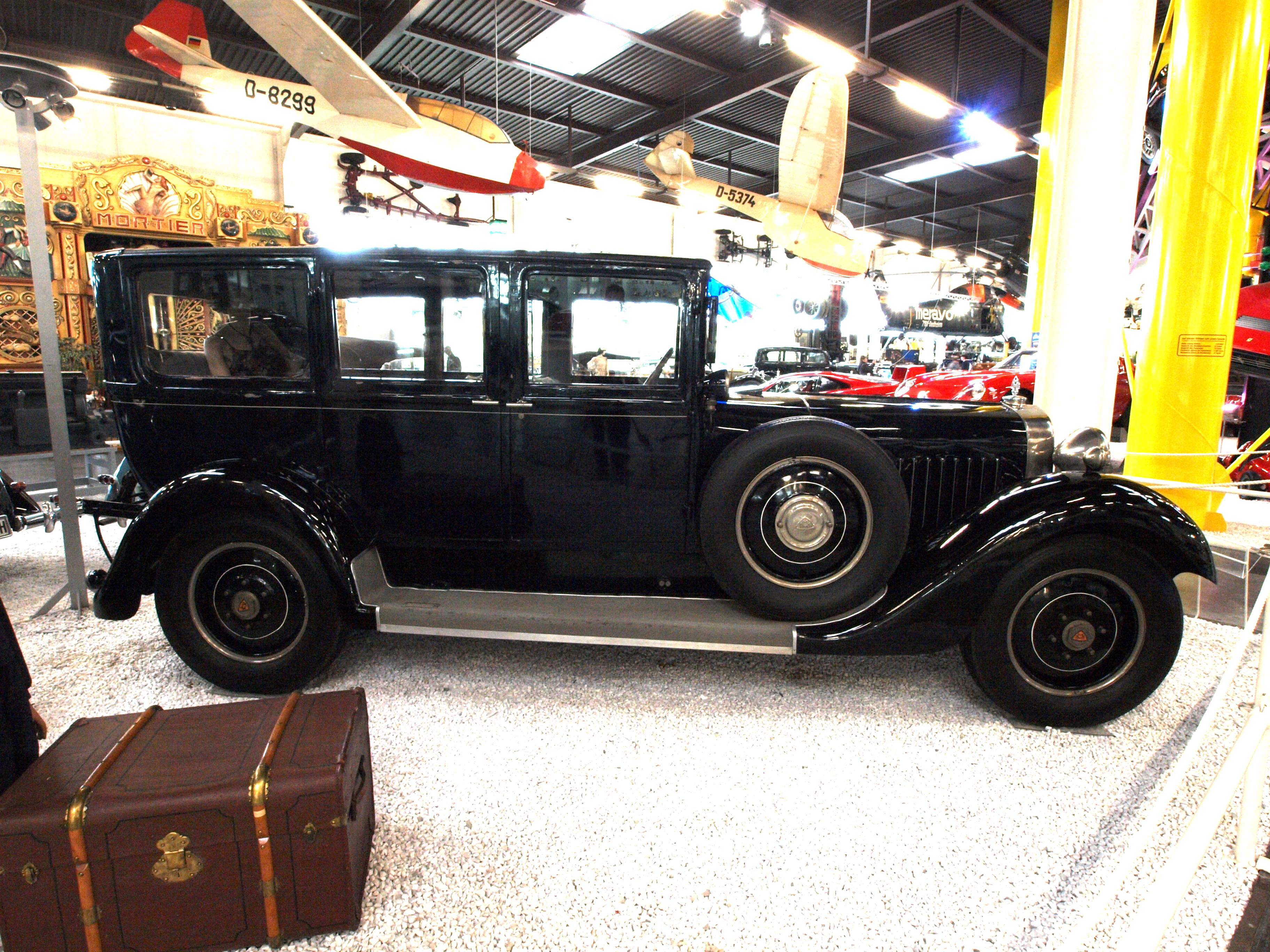 Maybach W 5 von 1926, 1928 umgebaut auf SG (Schnellgang), im Auto- und Technikmuseum Sinsheim